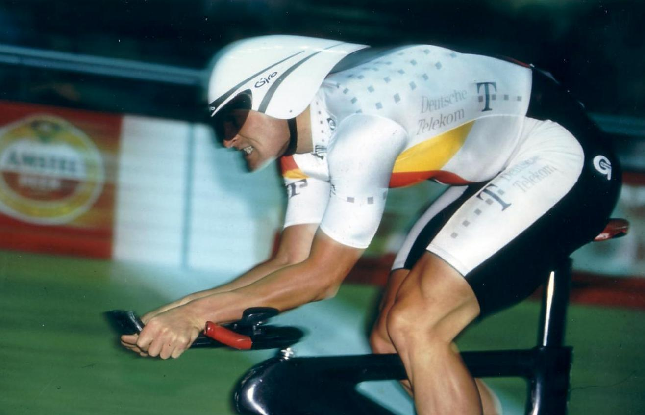 Sören Lausberg, Bahn-WM 1996, 1000-Meter-Zeitfahren